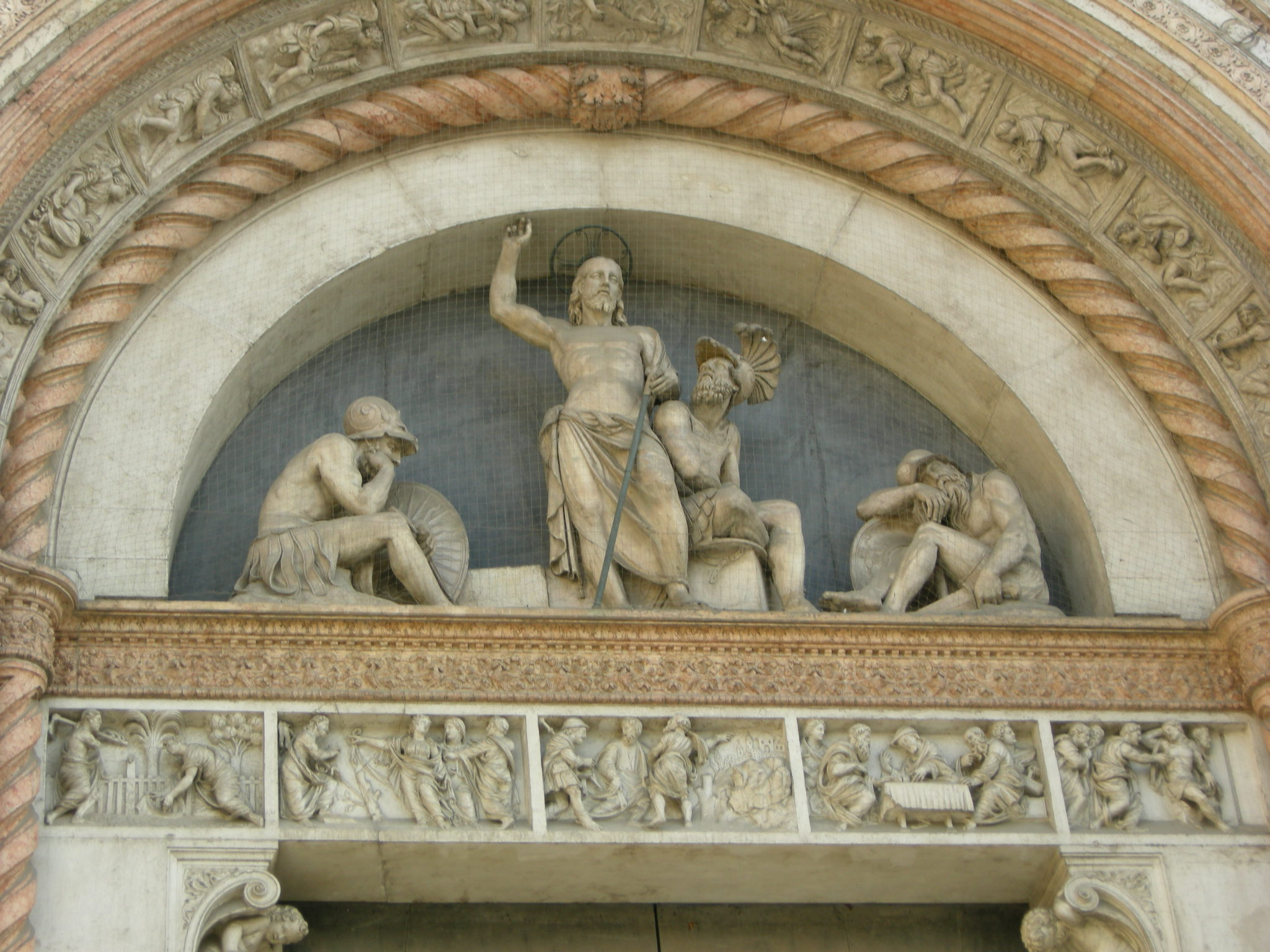 San petronio, lunetta con resurrezione di Alfonso Lombardi 2